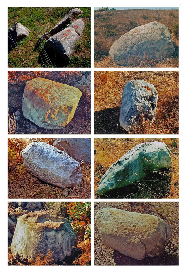 menires decorados de vila do bispo